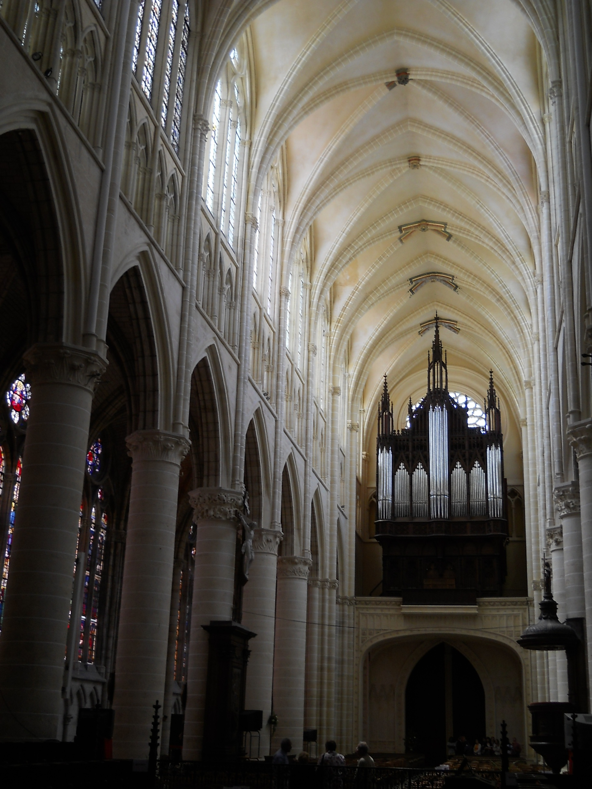 Châlons-en-Champagne, Kathedrale St-Etienne, Blick im Hauptschiff nach Westen